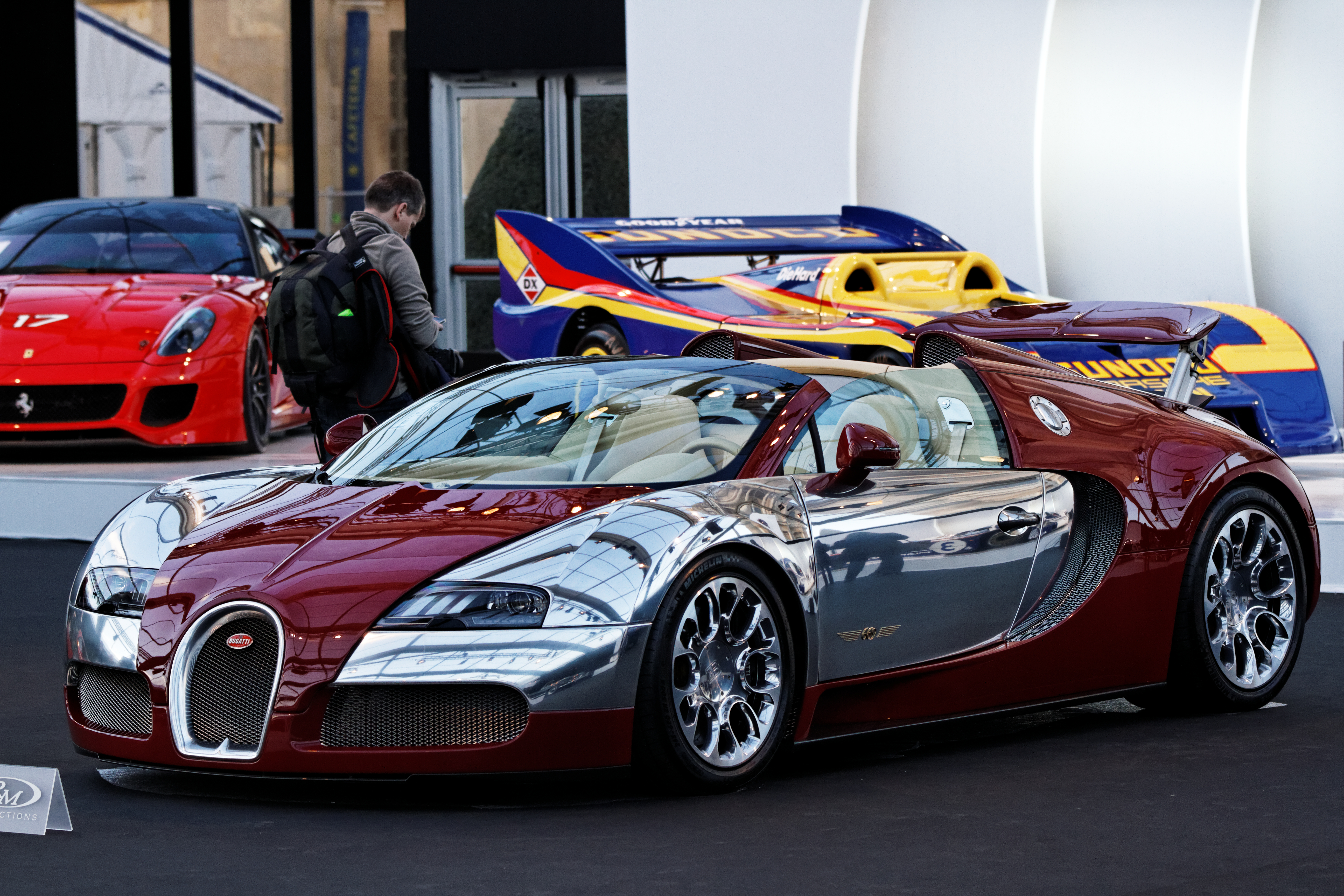 Une Bugatti Veyron 16.4 Grand Sport de 2010.